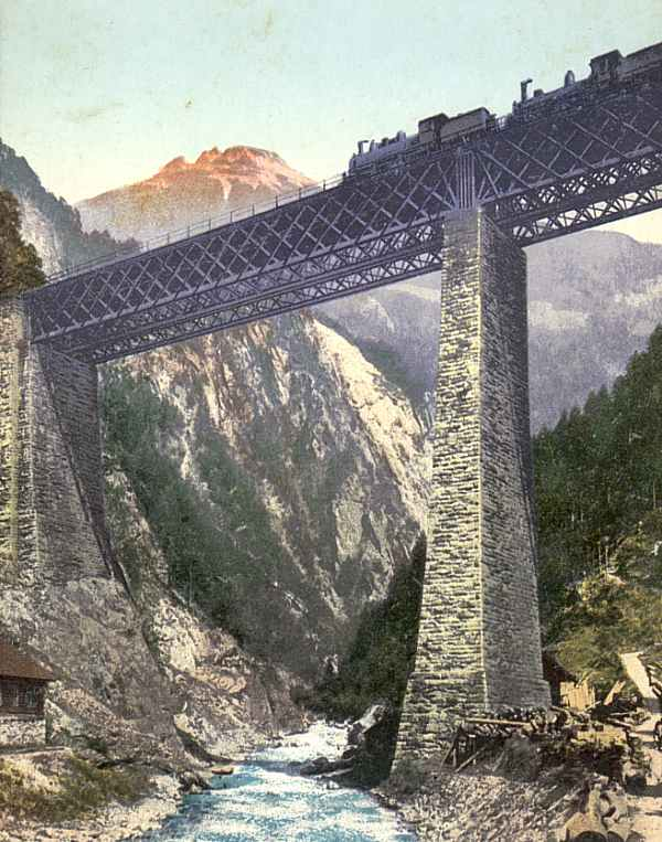 Chärstelenbach-Viadukt der Gotthardbahn mit Dampflokomotiven D 4/4 und D 3/3; Blick auf die Windgälle.